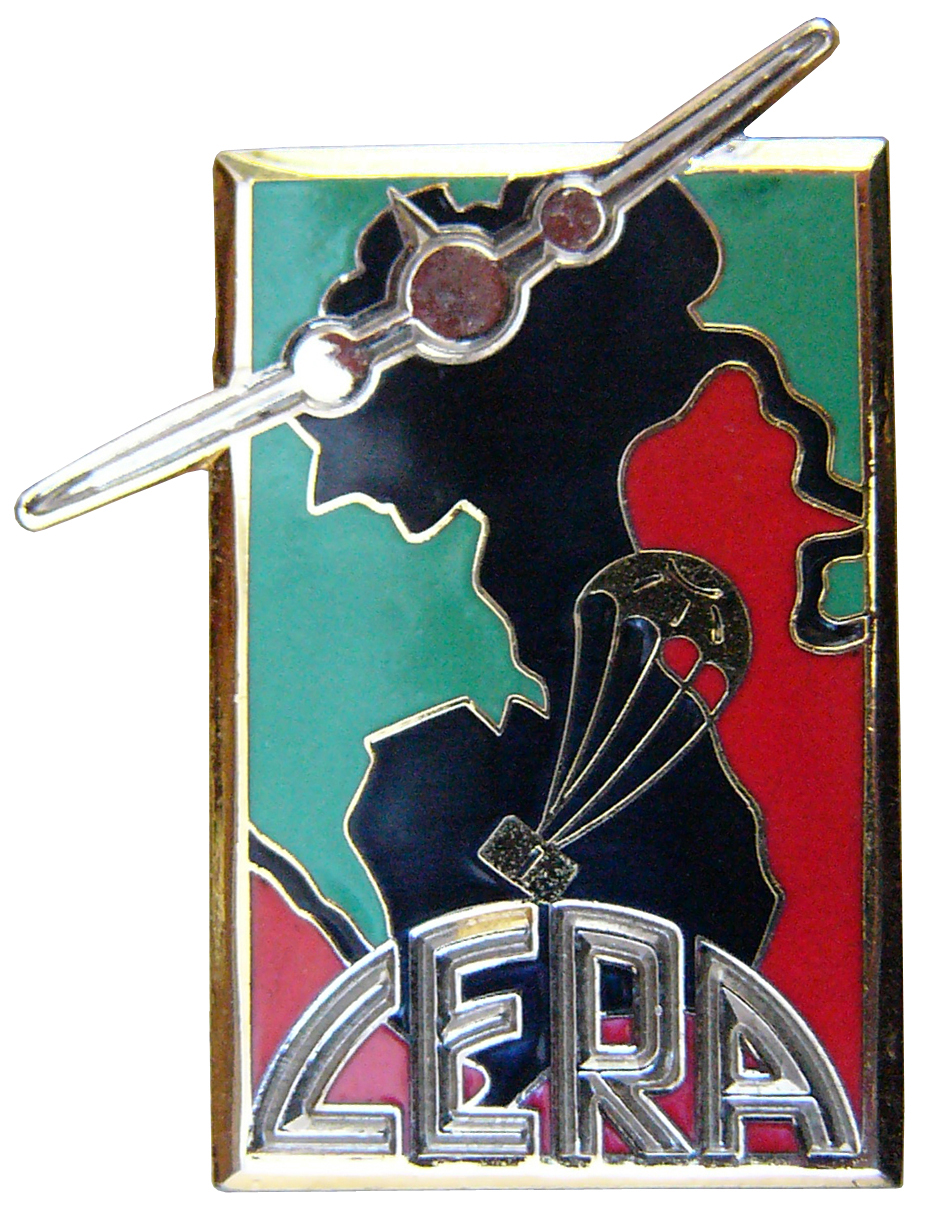 Insigne de la compagnie étrangère de ravitaillement par air